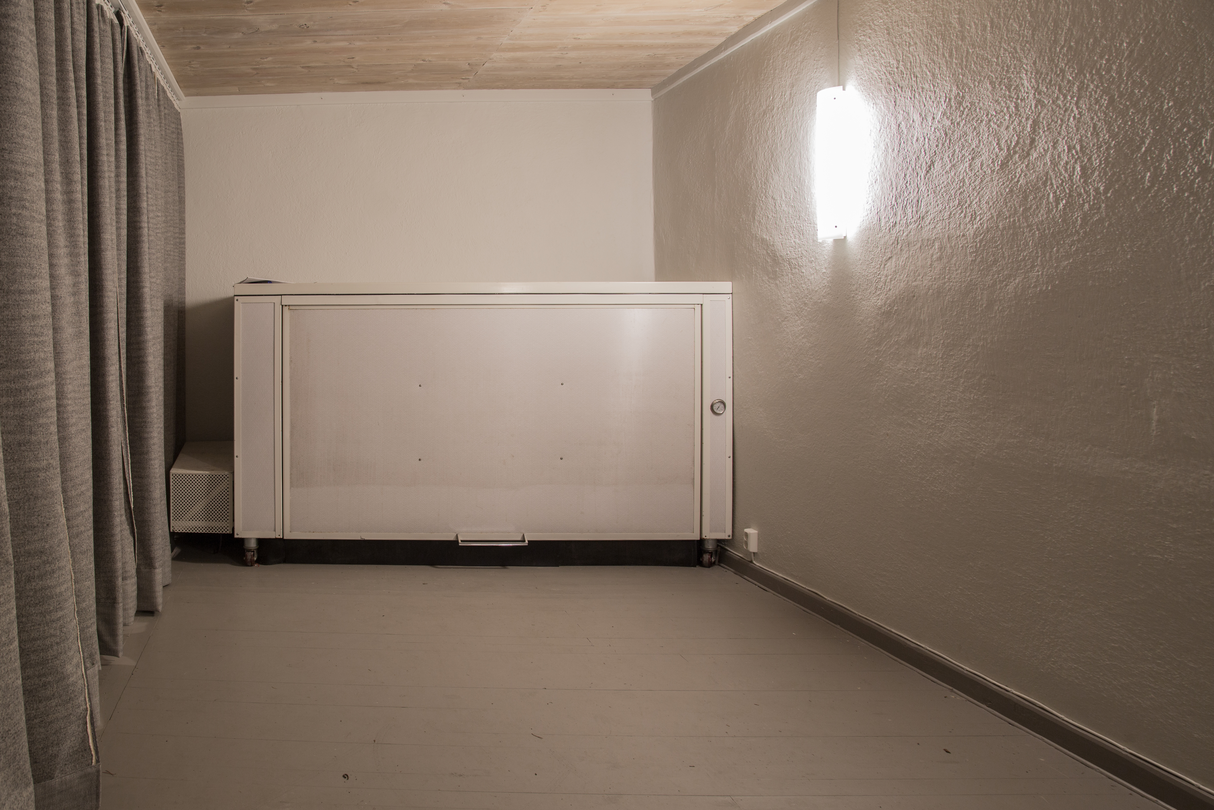 Likkyl i bisättningshuset till Garpenbergs kyrka, uppfört 1861.